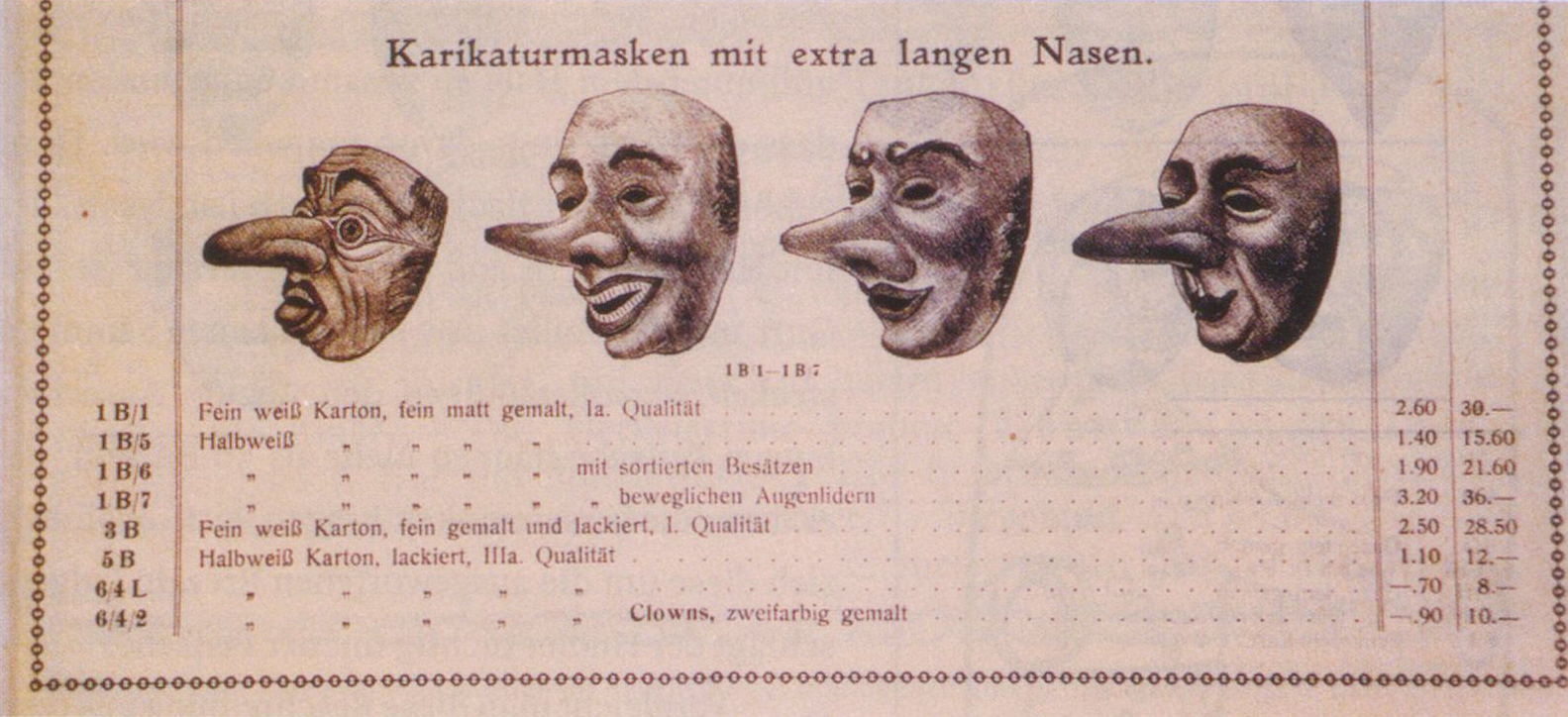 "Karikaturmasken mit extra langen Nasen" aus dem Katalog der Maskenfabrik Nick, Sonneberg 1897; Deutsches Spielzeugmuseum Sonneberg S V 27 f/2